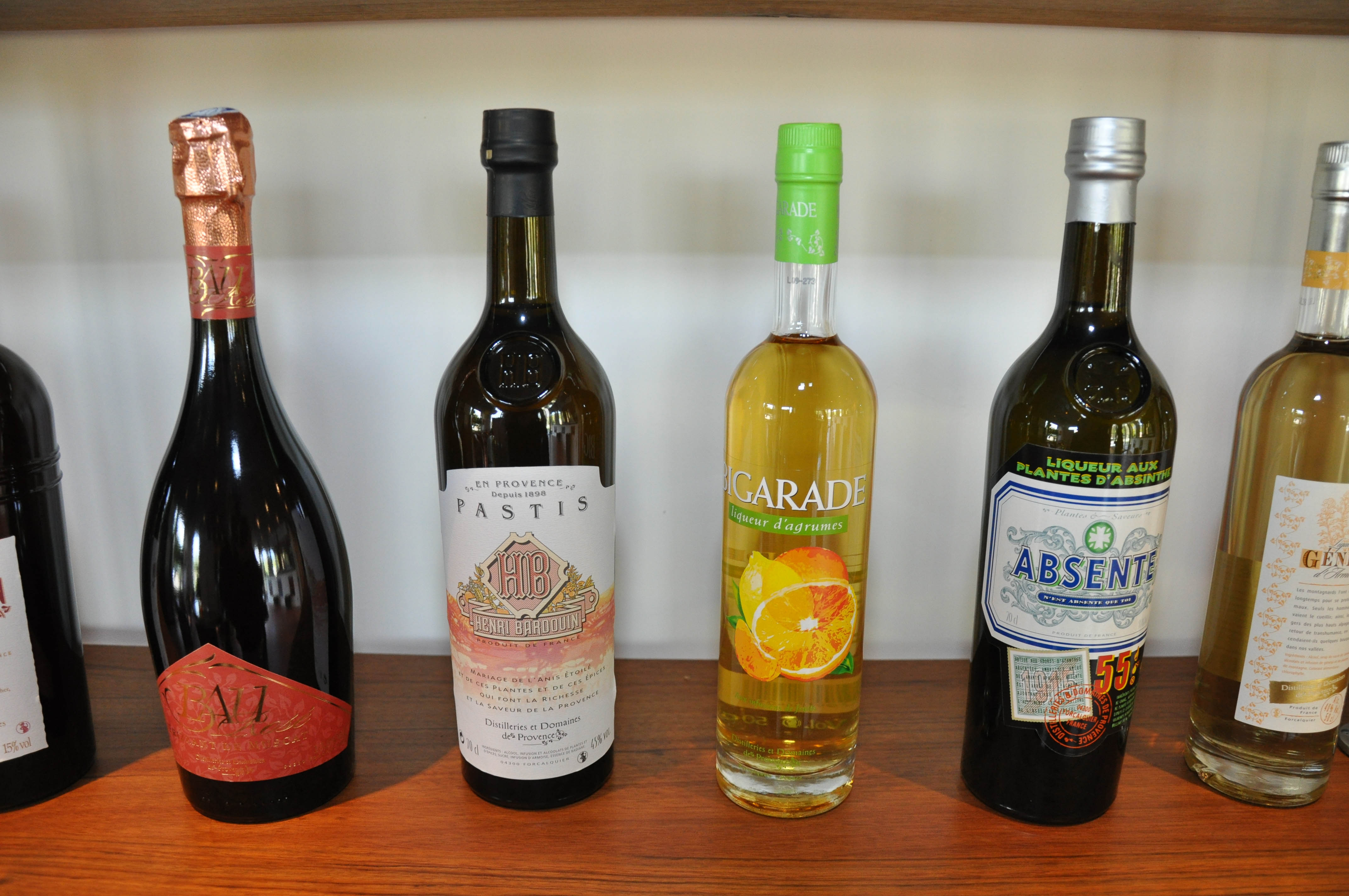 Produits des distilleries de Forcalquier